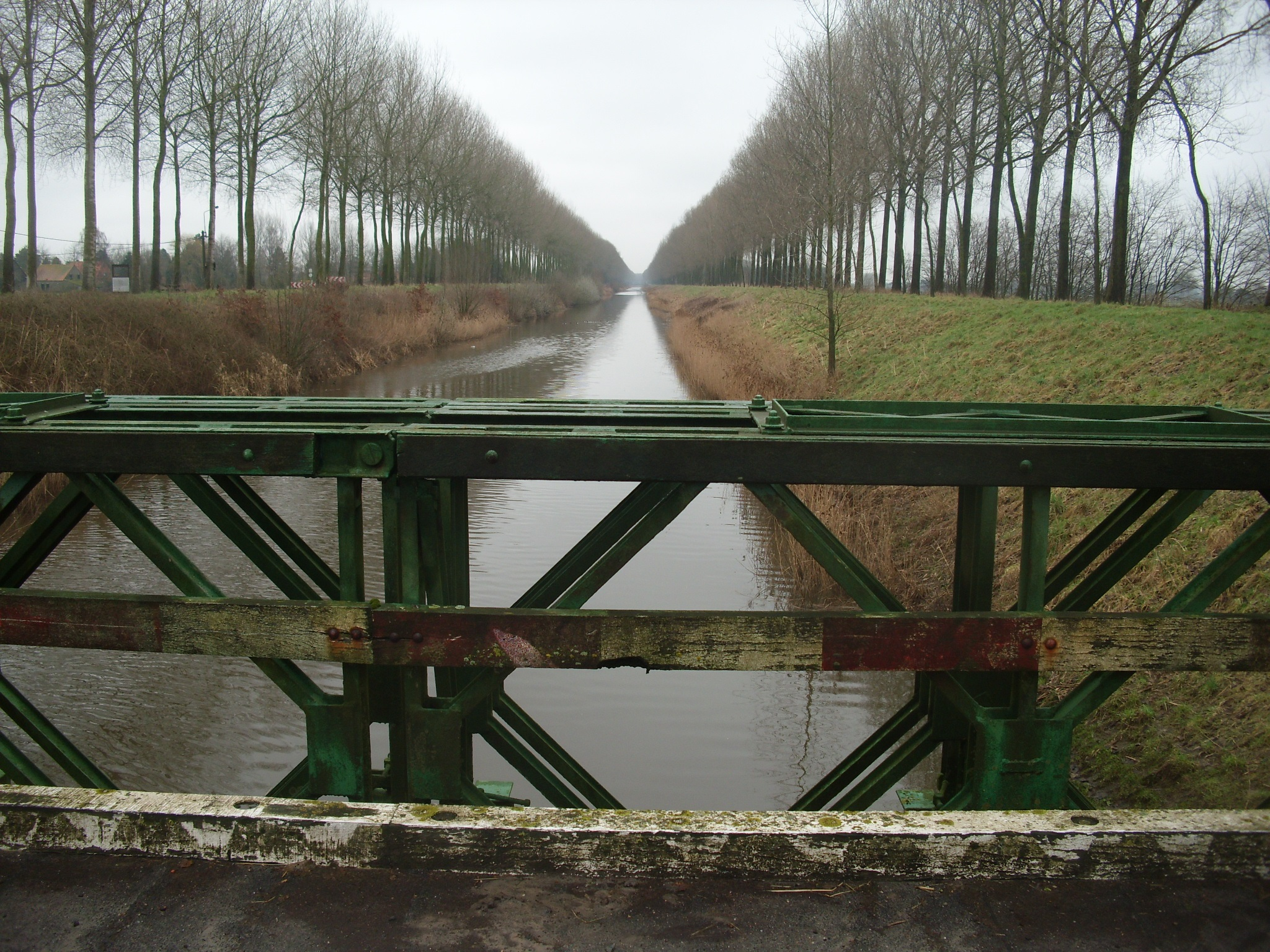 De Baileybrug over het Leopoldskanaal - verbinding tussen Boomstraatje en Vlotweg - Sint-Laureins - Oost-Vlaanderen - België